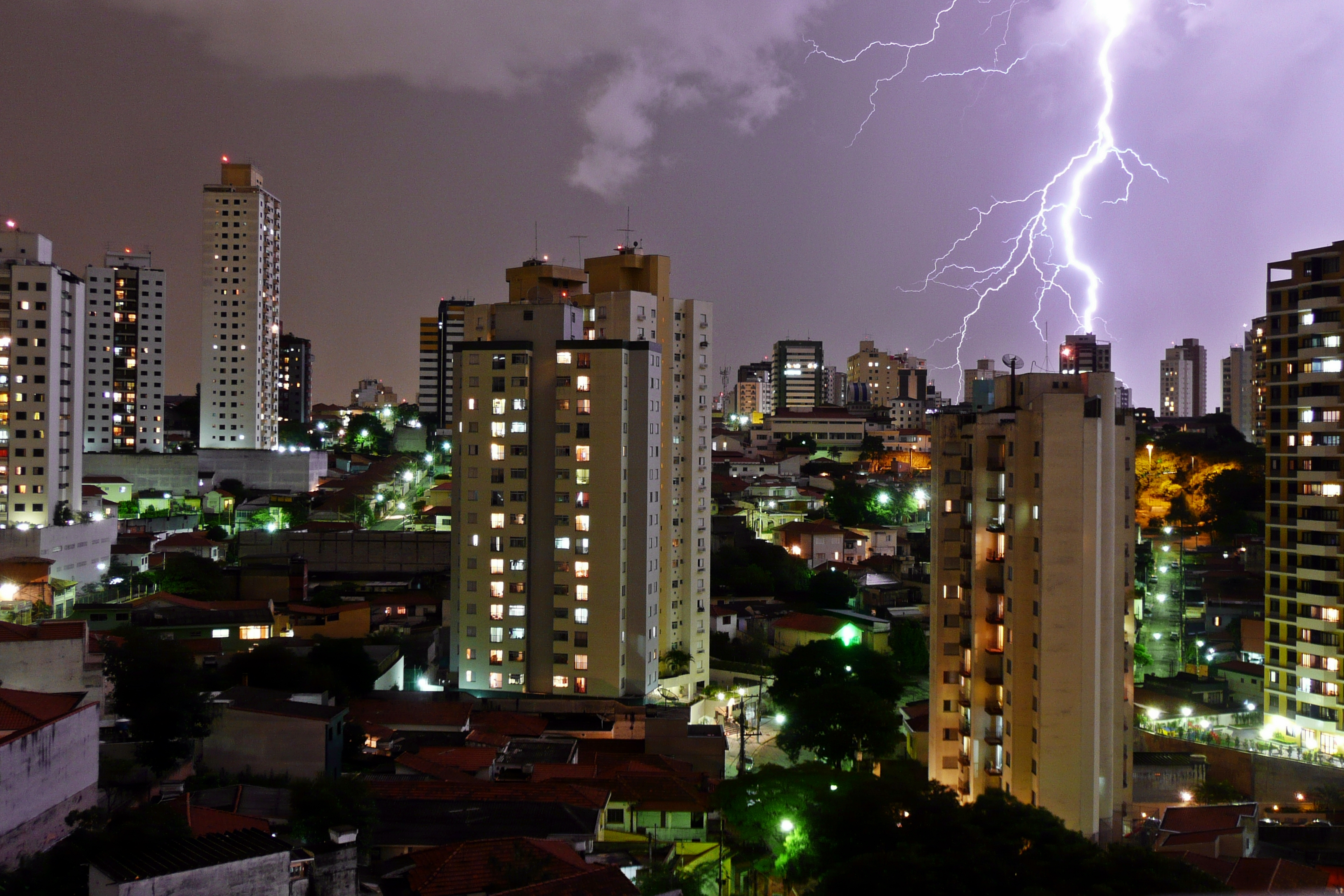 Tempestade com raios em São Paulo, Brasil.